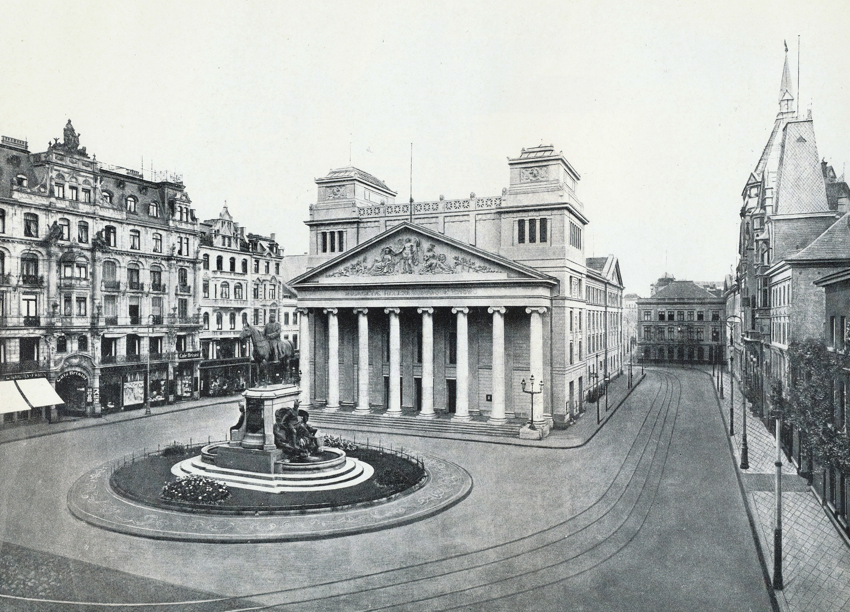 Stadttheather Aachen mit dem Theaterplatz 1925